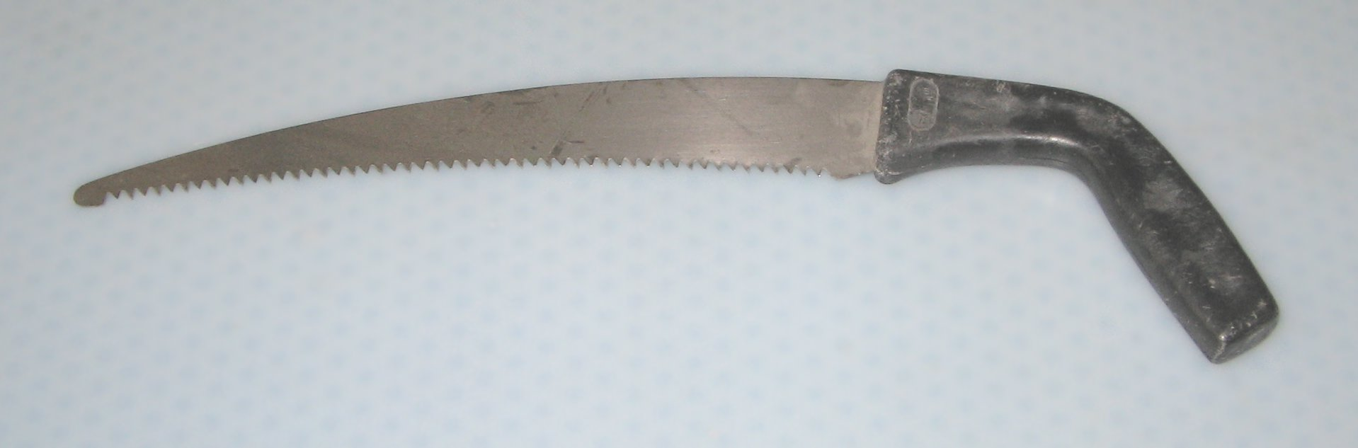 Segilo por ligno La foto estis farita de mi mem.